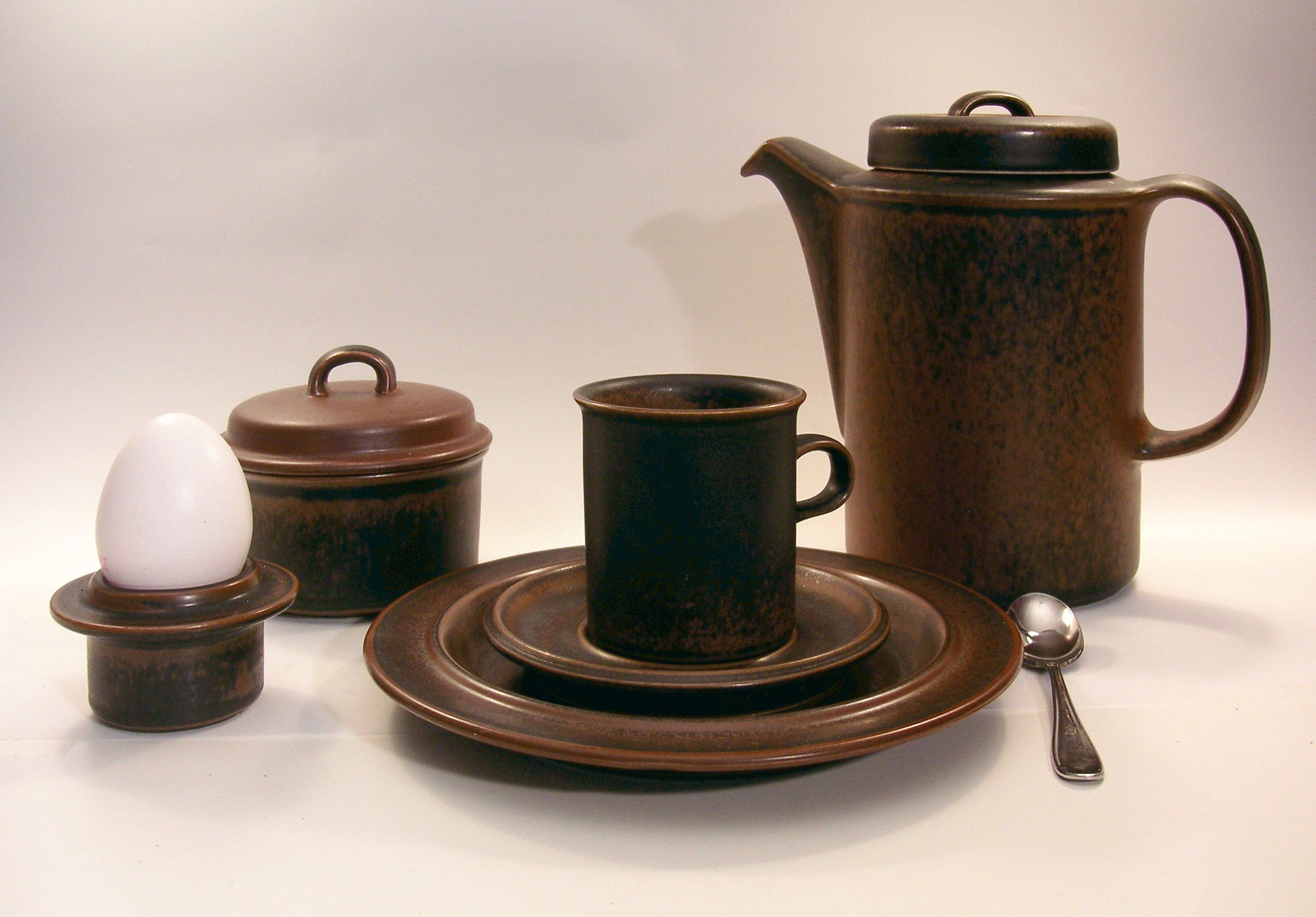 Arabia servis från 1970-talet